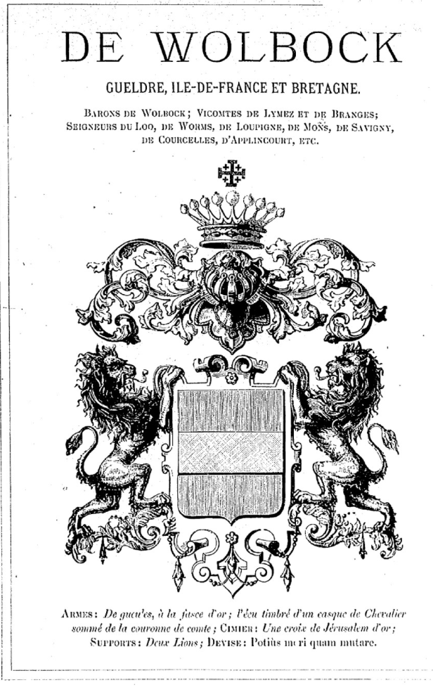 Page de garde du mémoire inséré dans le Nobiliaire Universel